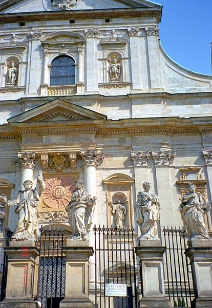 Fragment fasady kościoła św. Piotra i Pawła w Krakowie, projekt Giovanniego Trevano.